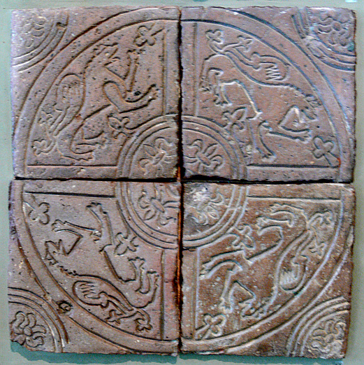 Bodenfliesen aus dem Kloster Weingarten, Ende 13./Anfang 14. Jh. Württembergisches Landesmuseum Stuttgart